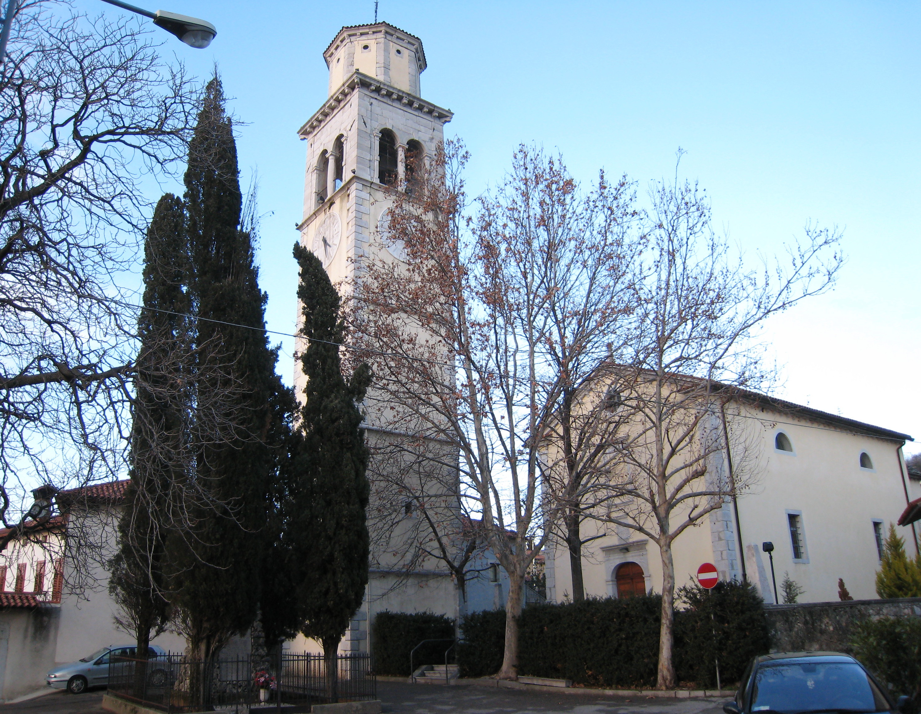 L'abitato di Sgonico (TS). Gennaio 2008